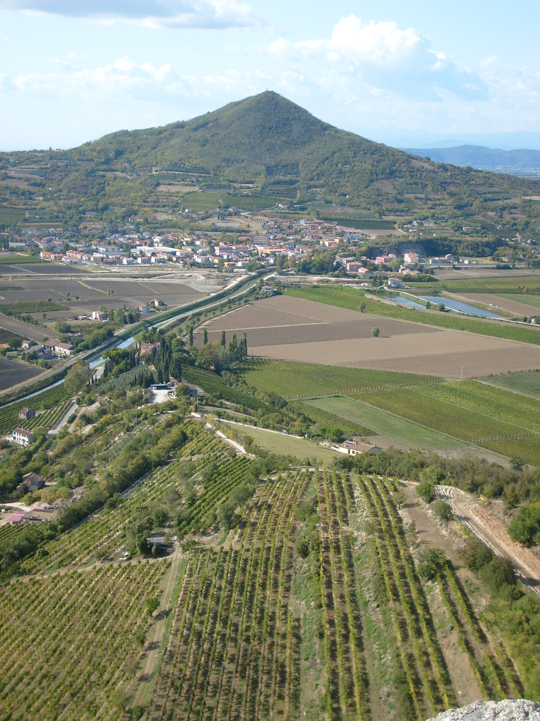 Il Monte Lozzo e Lozzo Atestino visti dal Buso dei Briganti sul Monte Cinto